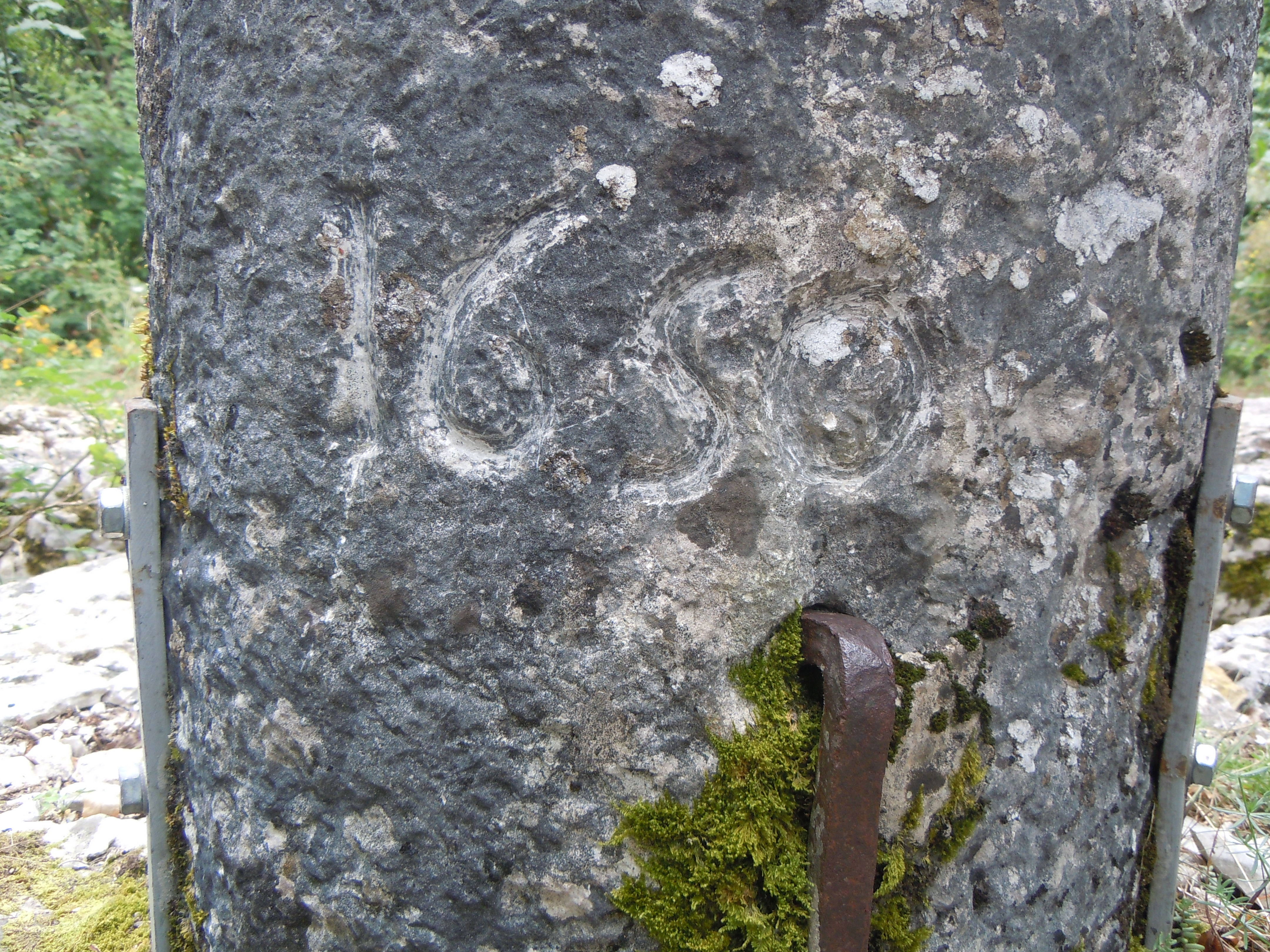 Inscription 1650 à la base de la Croix de Chevru à Yenne